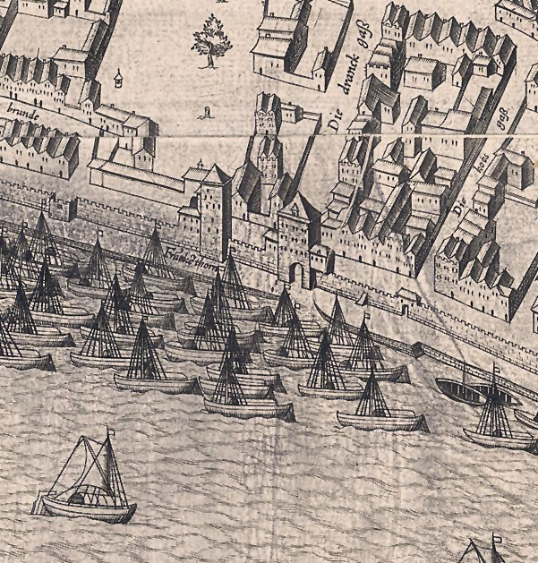 Ausschnitt eines Stadtplanes mit Frankenturm (Köln) und Umgebung.